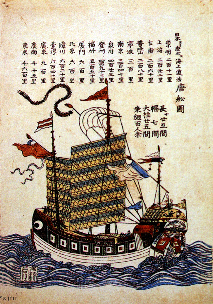 出处：《はるかなる陶磁の海路展》第98页155图 纪年：19世纪 唐船图（木版多色刷）-文锦堂版